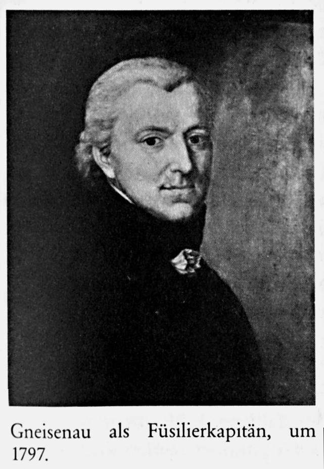 Portrait des August Neidhardt von Gneisenau als Füsilierkapitän, um 1797. Die Narbe auf der rechten Wange stammt von einem Reitunfall als Knabe.